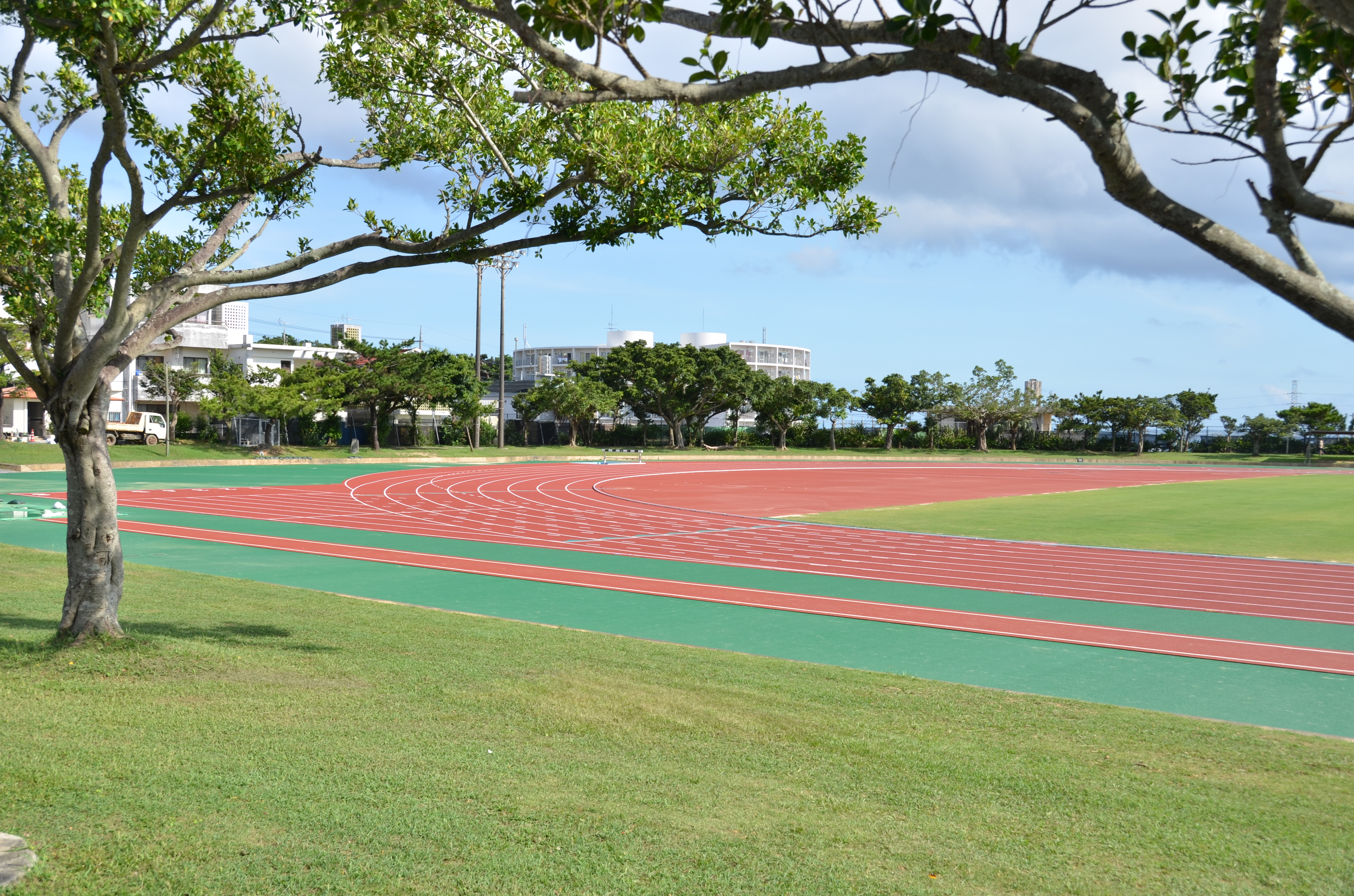 沖縄県金武町にある町営の陸上競技場